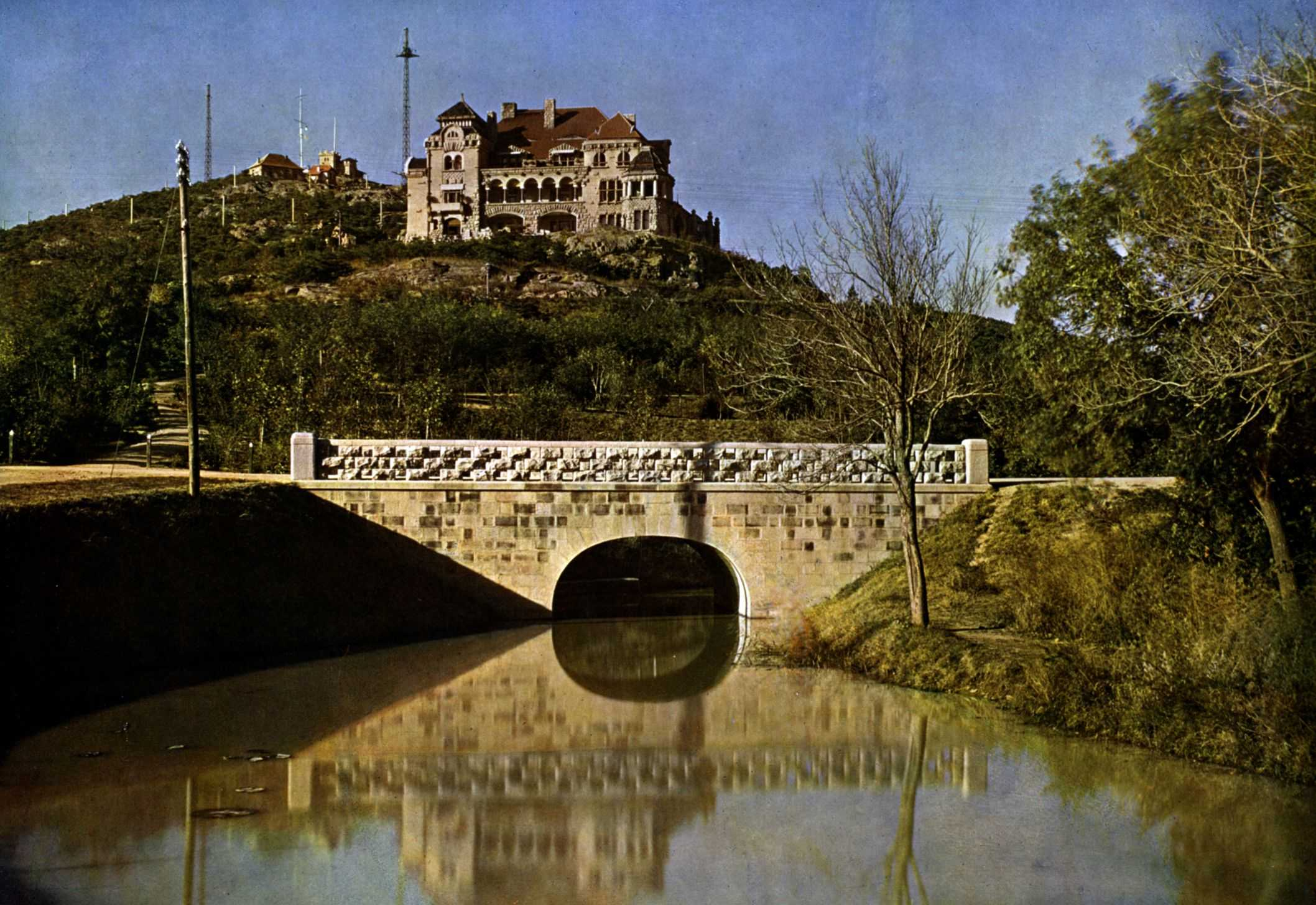 Wohnhaus des Gouverneurs Tsingtau